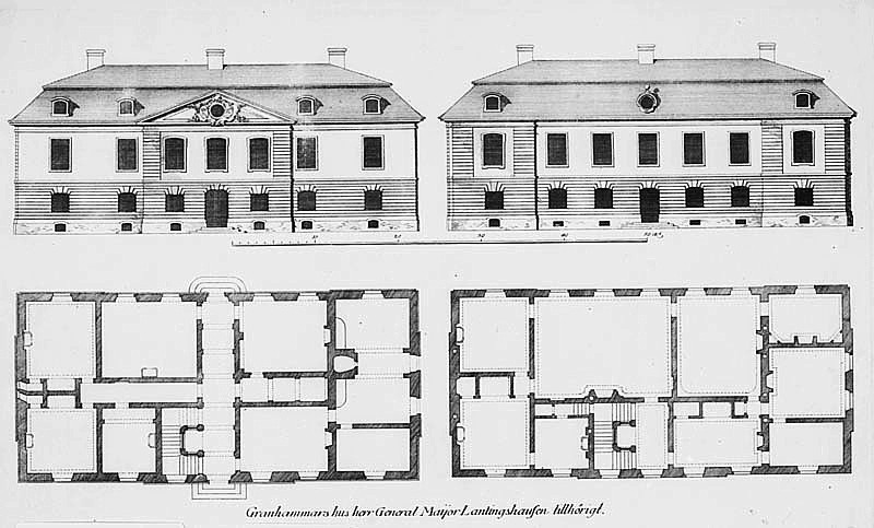 Granhammar slott innan påbyggnad